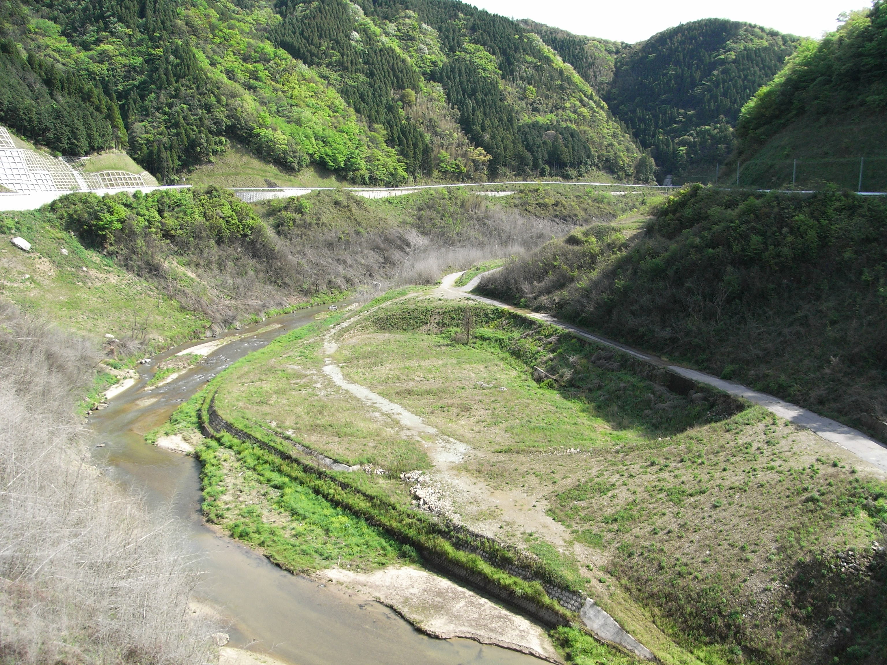 Lake